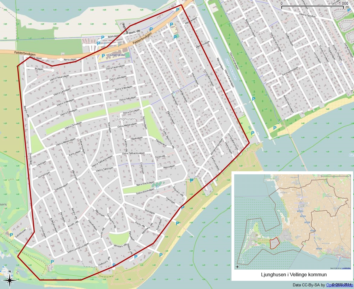 Tätorten Ljunghusens gränser 1990 enligt Atlas över rikets indelningar 1992.